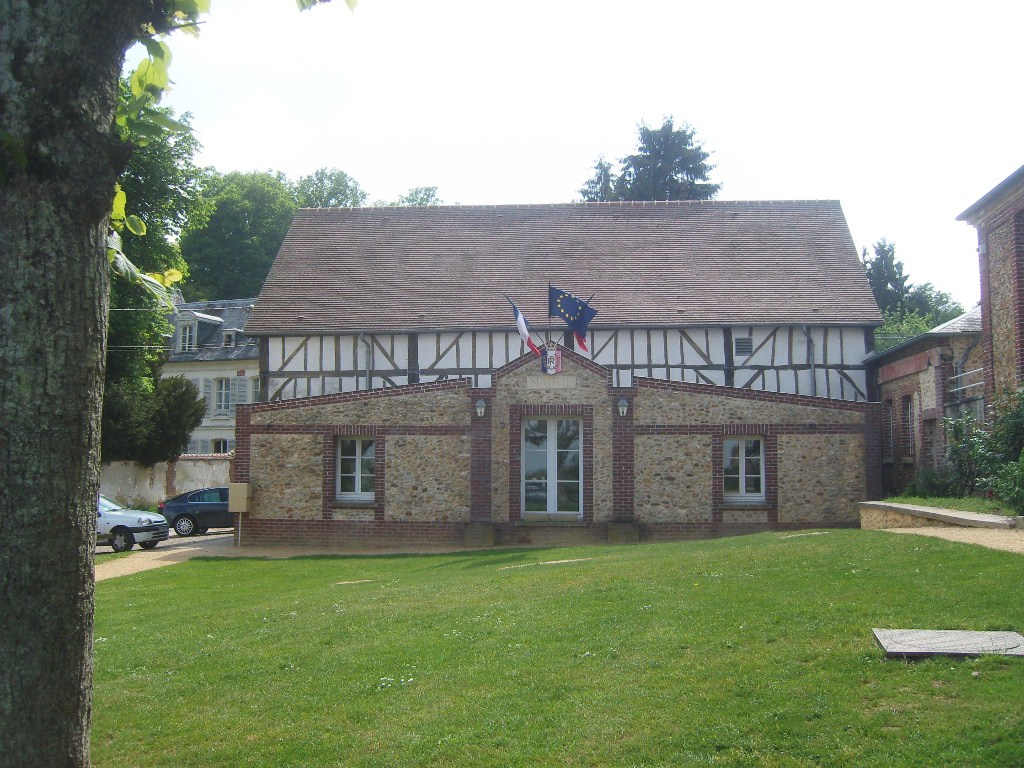 Neuville-Bosc (Oise, France) - mairie